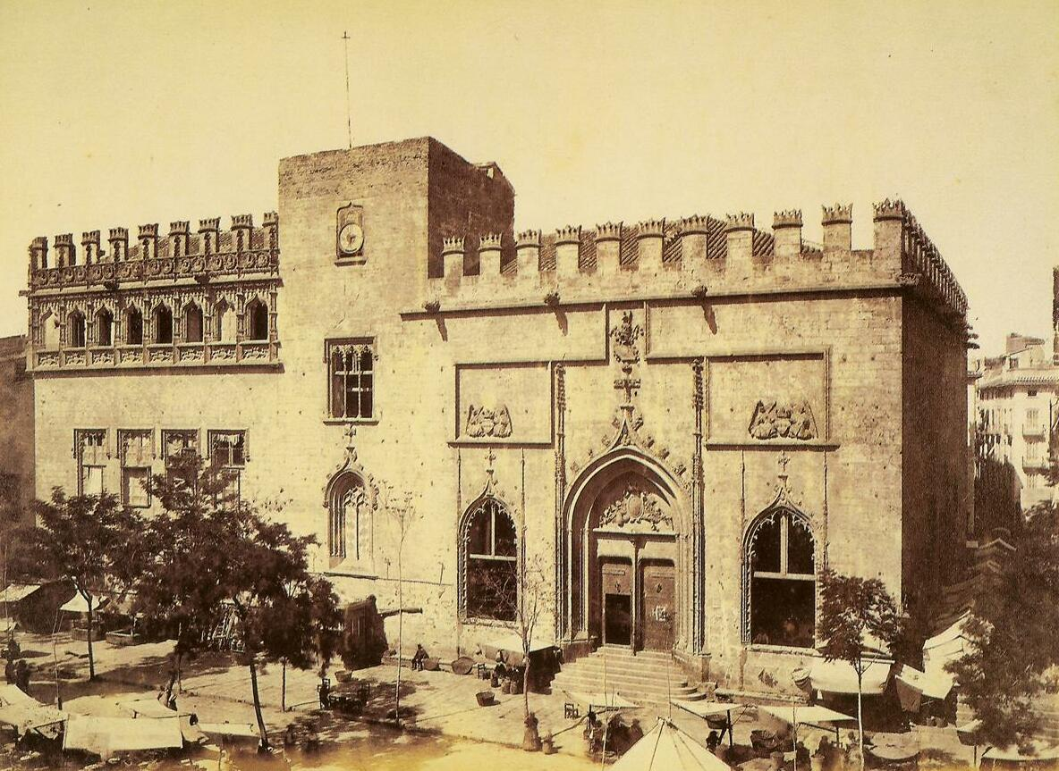 Llotja de València o de la Seda, vers 1870, Jean Laurent (1818-1886).